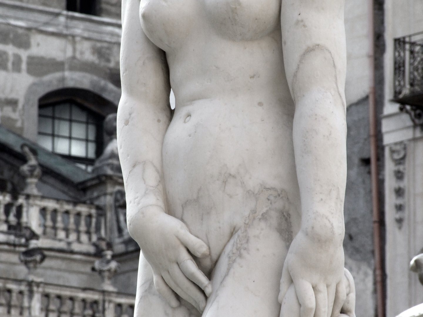 palermo catania catane siracusa syracuse brucoli augusta ognina acicastello acitrezza volcano vulcano etna sicilia sicily italia italy nature sea beach sun summer town city light landscape free europe europa eu wallpaper michael castielli resolution vacation holiday travel flight Creative Commons CC0 CC Zero panoramio flickr google GNU